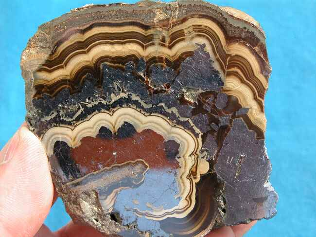 sfaleryt i galena, pochodzenie Polska, Olkusz; autor zdjęcia Piotr Menducki